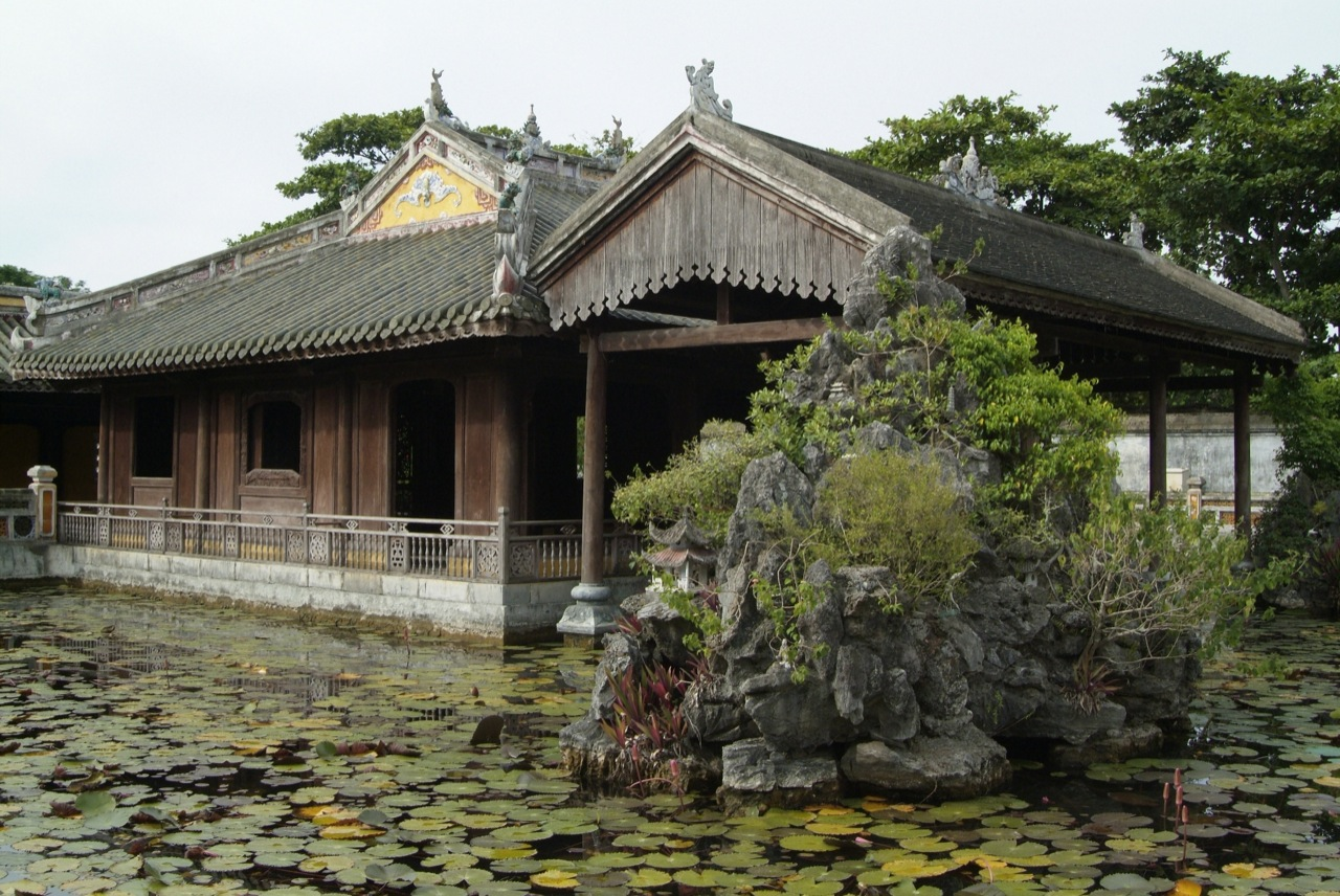 Dai Noi : Imperial palace Hue